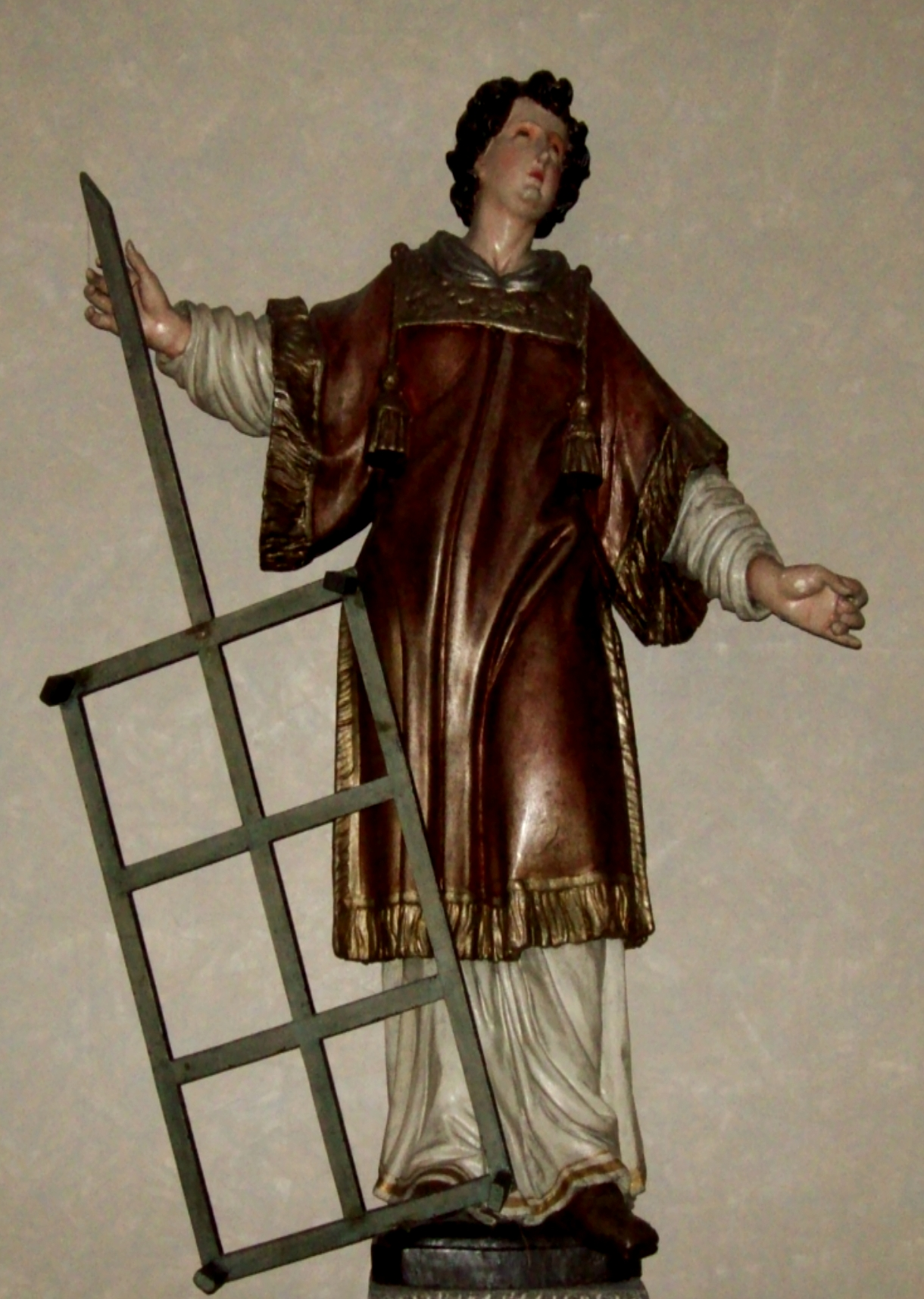 St. Laurentius Aschaffenburg Leider - Kirchenpatron - Holzplasik aus der alten Kirche